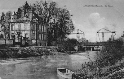 canal du XIXe siècle à Anglure